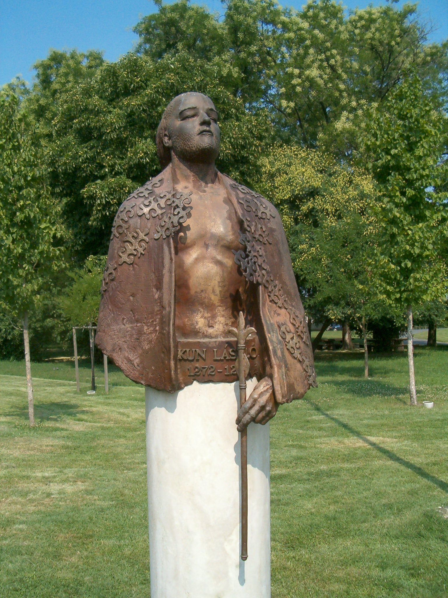 Kun László királyNemzeti Történeti Emlékpark / National Historical Memorial Park in Ópusztaszer, Hungary(Györfi Sándor alkotása)